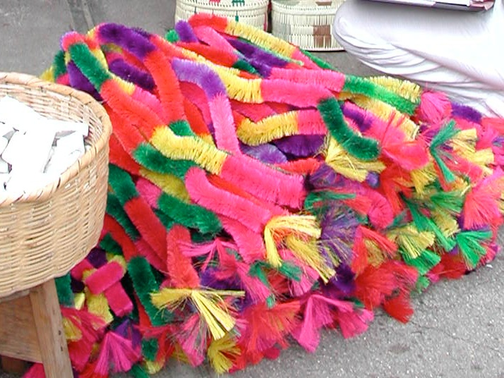 Guirlandes décorées d'Esquipulas (Guatemala)